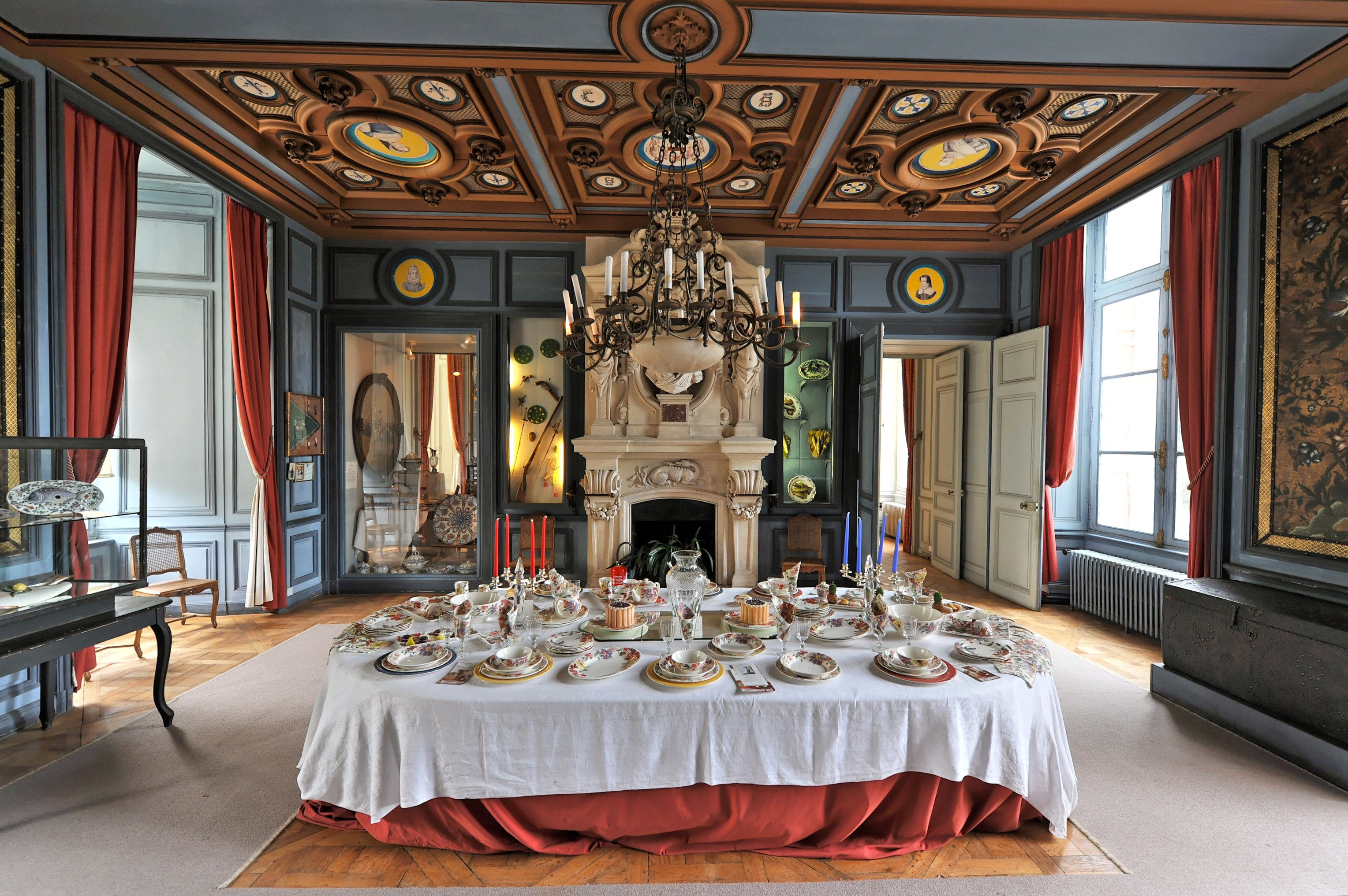 Esszimmer des Schlosses La Bussière